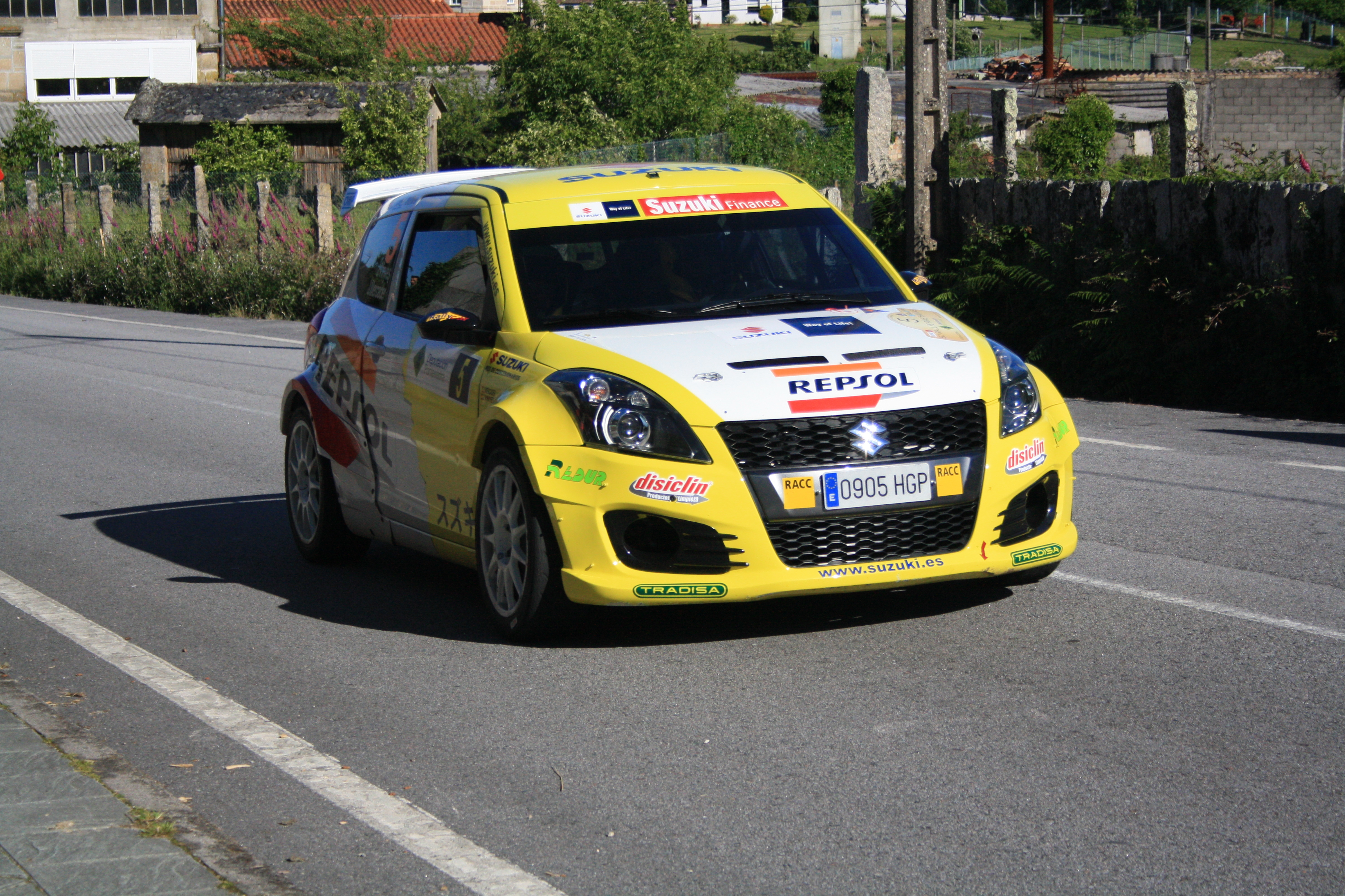 Joan Vinyes, en Rías Baixas 2014, tramo en Covelo